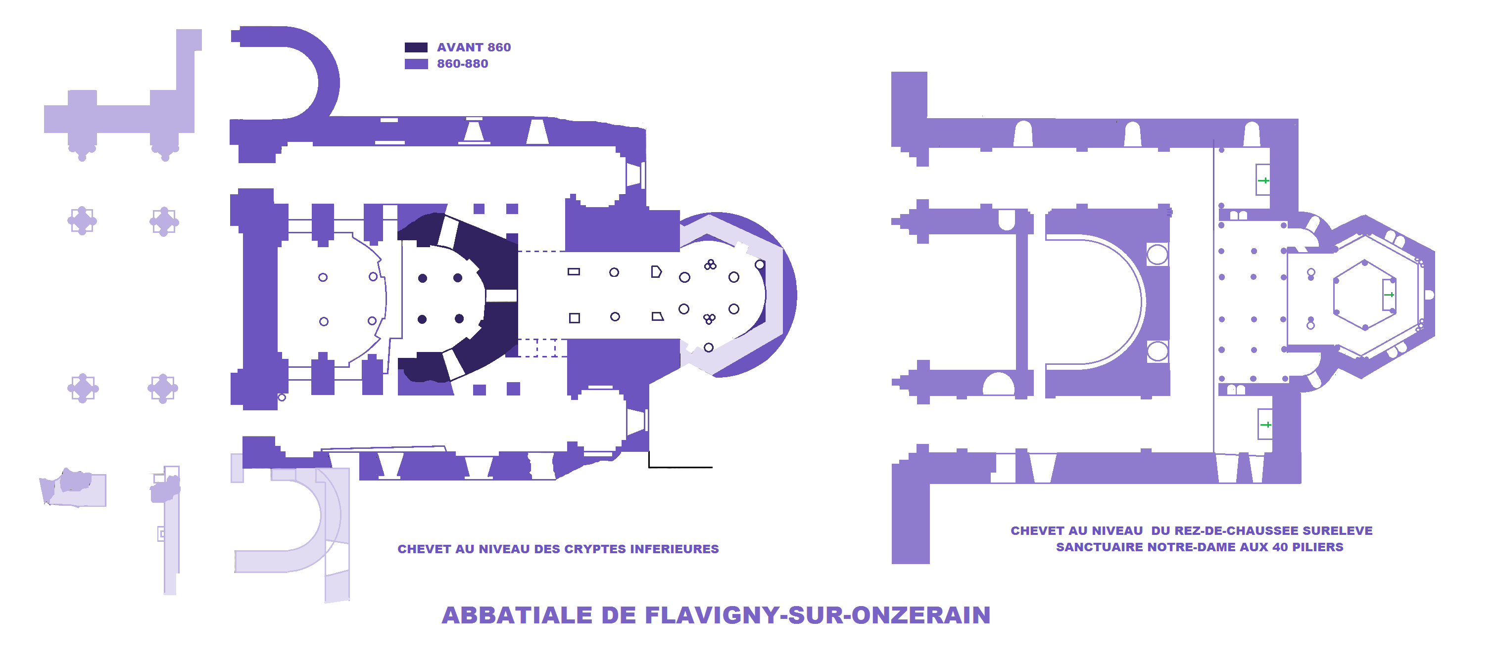 Abbatiale de Flavigny-sur-Ozerain, Plan du chevet au niveau des cryptes inférieures